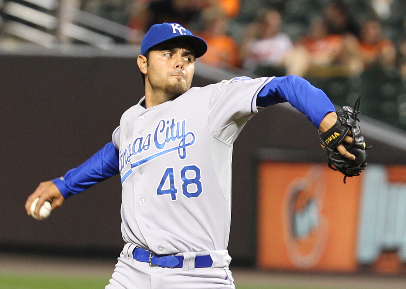 Joakim Soria